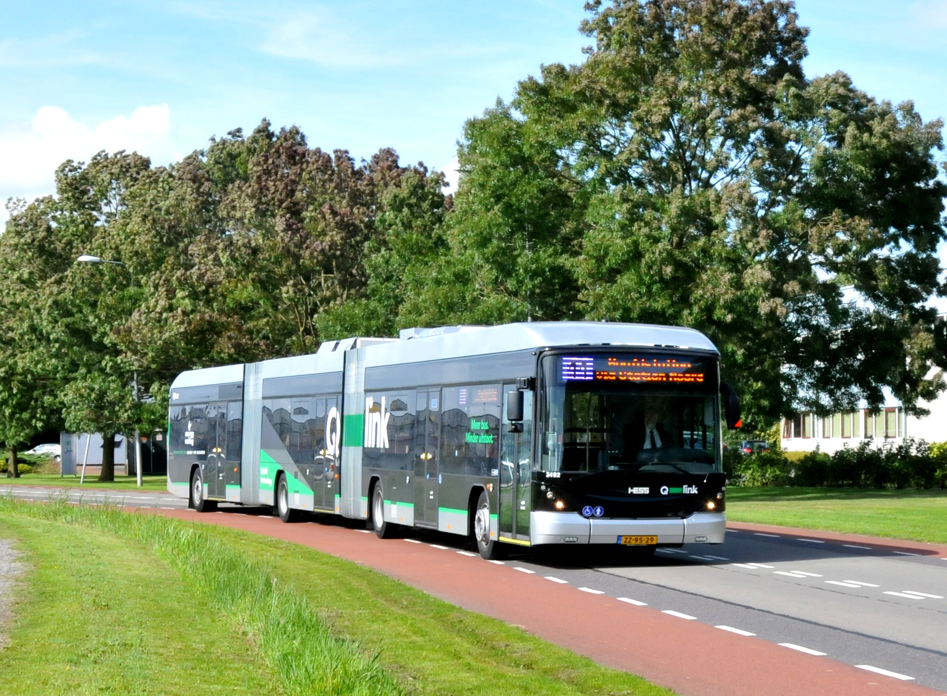 Qbuzz bus 3492 van het type Hess SwissHybrid te Groningen.